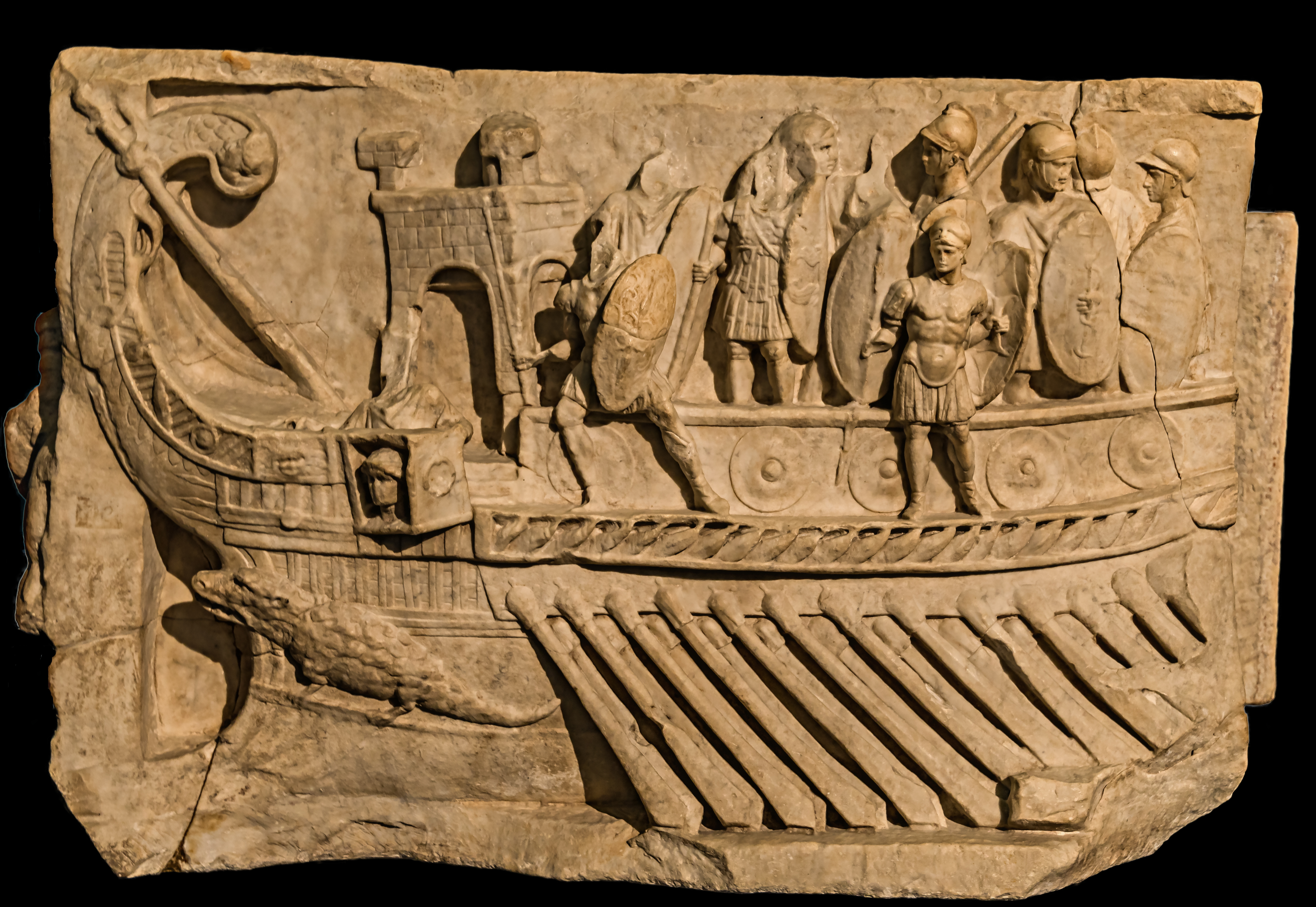 Das Relief wurde 1765 in Palestrina von Winckelmann im antiken Palestrina entdeckt, der die Marmortafel als Teil einer Spende an das Heiligtum der Fortuna Primigenia hielt. Die moderne Forschung geht nach neuesten Studien davon aus, dass das Relief tatsächlich der Teil eines Grabmals war, das von einem Bürger aus Praeneste errichtet wurde, der wahrscheinlich in Octavians Flotte bei Actium 31 v. Chr. siegreich gekämpft hatte .